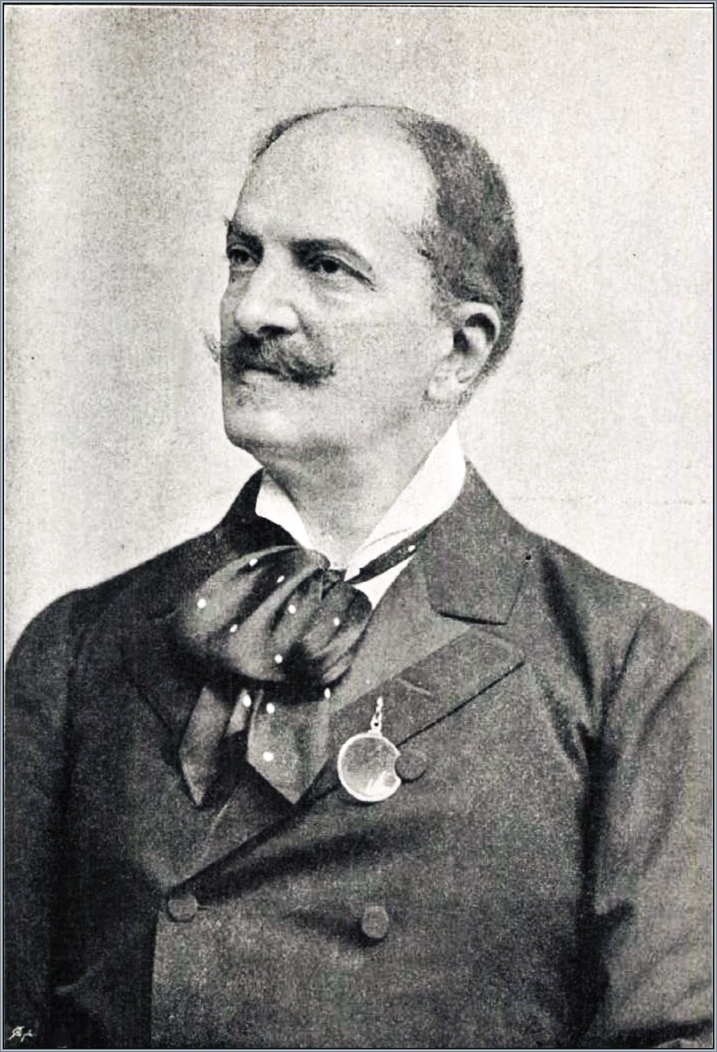 Gromon Dezső (1838–1912) politikus, honvédelmi államtitkár portréja. Ellinger Ede fényképfelvétele